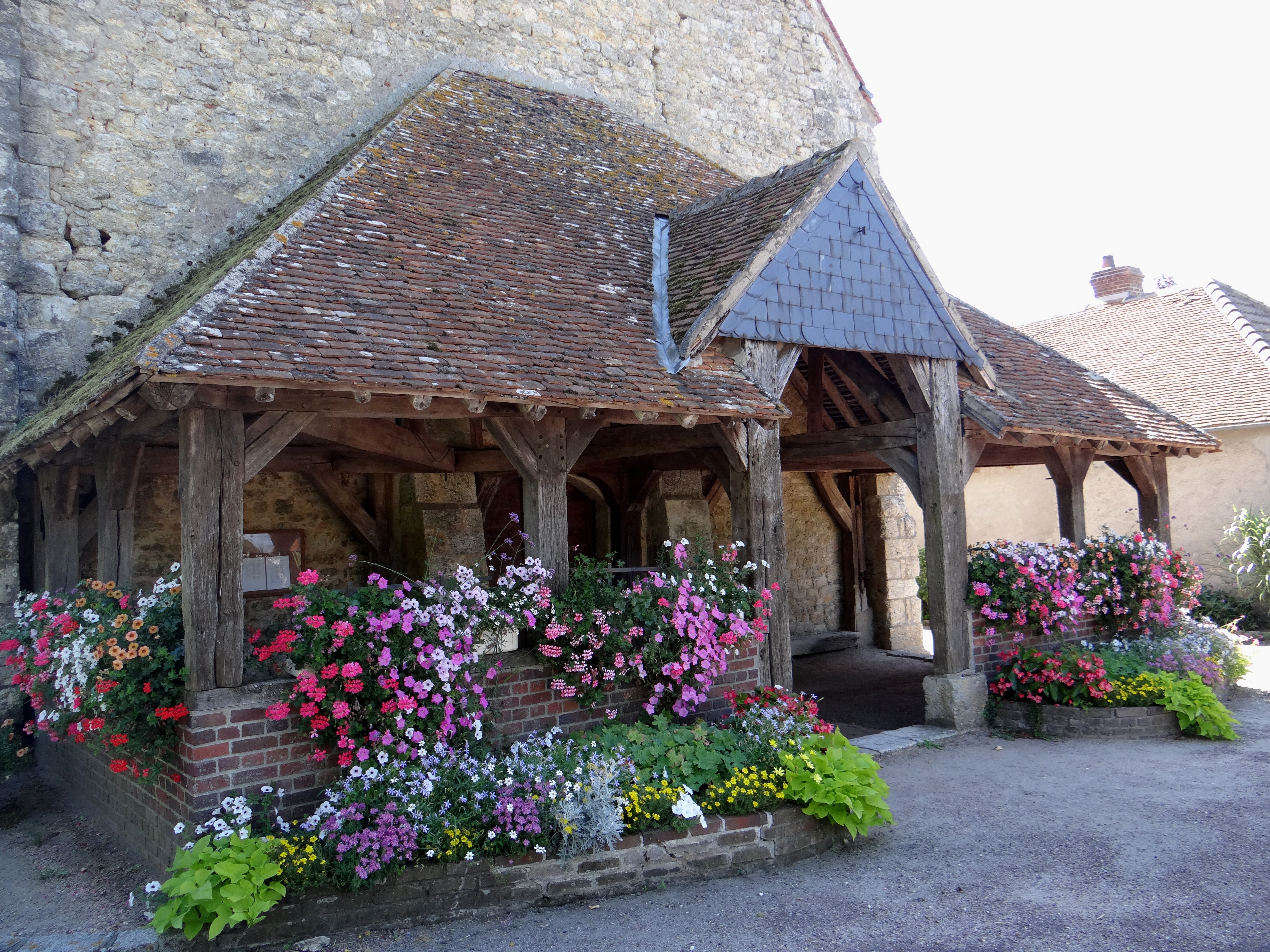 Le caquetoire de l'église Saint Laurent, Auvilliers-en-Gâtinais, Loiret, France